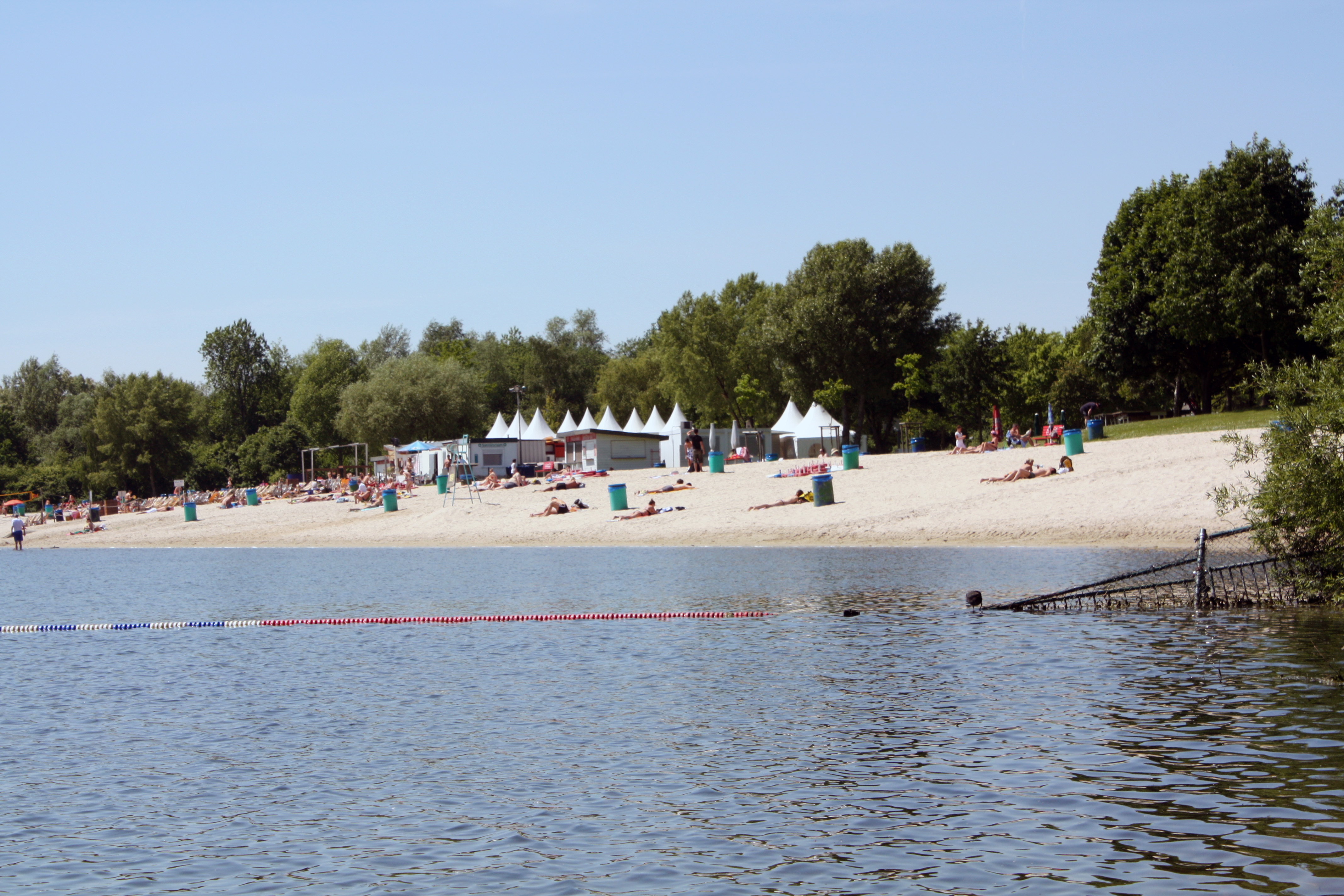 Otto-Maigler-See Hürth, offizieller Badestrand